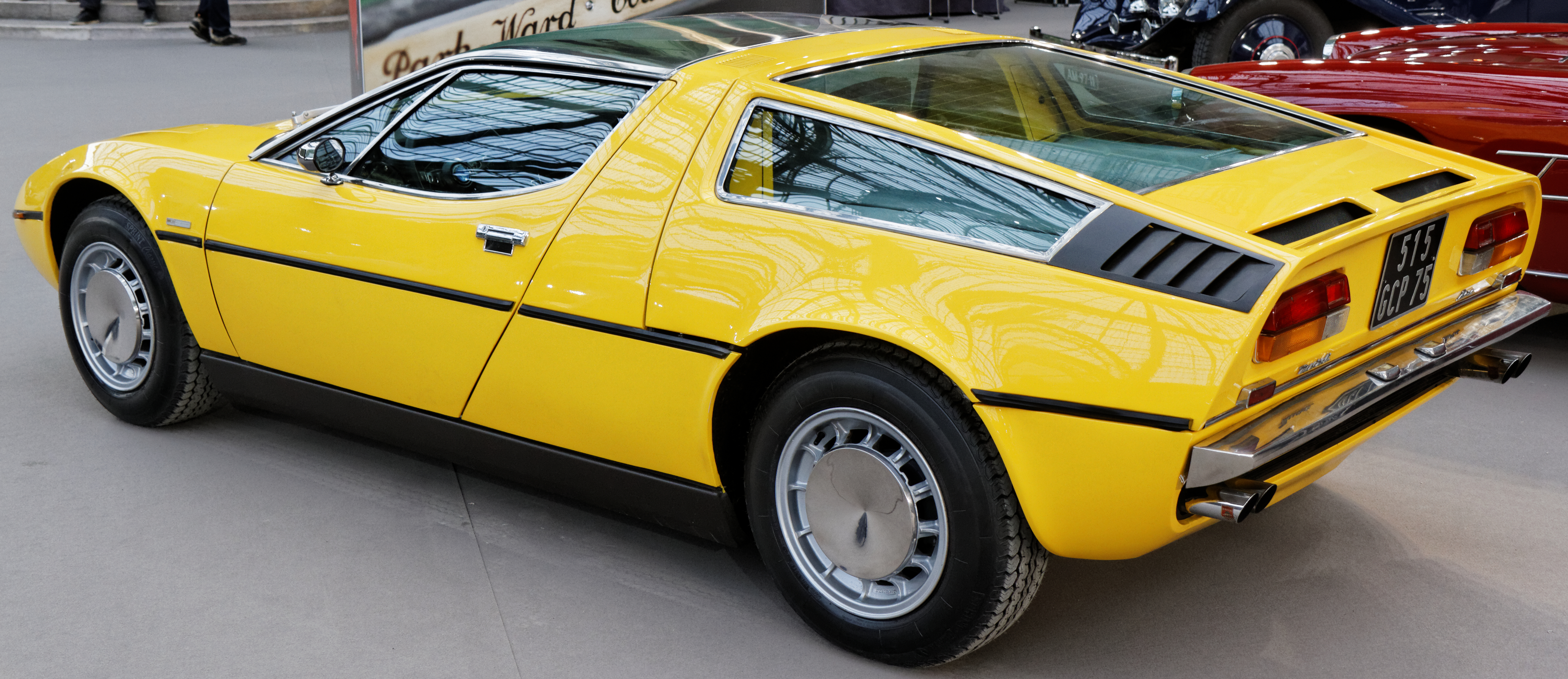 Une Maserati Bora 4.7 litre Coupé au Grand Palais lors de la vente Bonhams en février 2014.